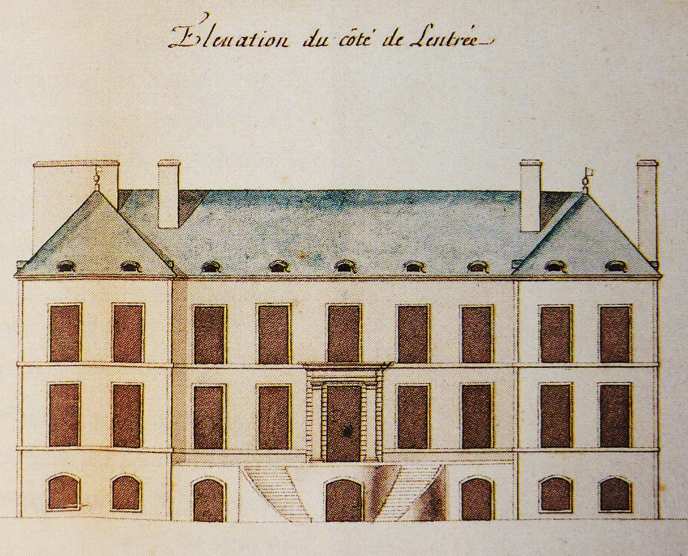 Archives nationales, Paris, Fonds de la Marine C7, 340, dossier Vaudreuil, 43. Dessin attribué à Gaspard-Joseph Chaussegros de Léry. Élévation de l'hôtel de Vaudreuil, construit en 1723; dessin réalisé en 1727. Résidence privée du gouverneur Philippe de Rigaud de Vaudreuil. Construite en 1723 mais détruite par un incendie 80 ans plus tard, la maison occupait une parcelle qui se trouve aujourd'hui sur place Jacques-Cartier. Entièrement conçue dans le style classique d'un hôtel particulier français. L'hôtel de Vaudreuil se compose d'un corps de logis à deux étages, flanqué d'ailes; deux escaliers semi-circulaires donnent accès à une terrasse surélevée et à une entrée. Les terrains rattachés à la propriété comprennent de grands jardins à l'arrière ainsi qu'un lot de l'autre côté de la rue Saint-Paul, volontairement laissé sans bâtiment pour assurer une vue agréable. Source: L'histoire du Vieux-Montréal à travers son patrimoine / Gilles Lauzon & Hélène Forget.